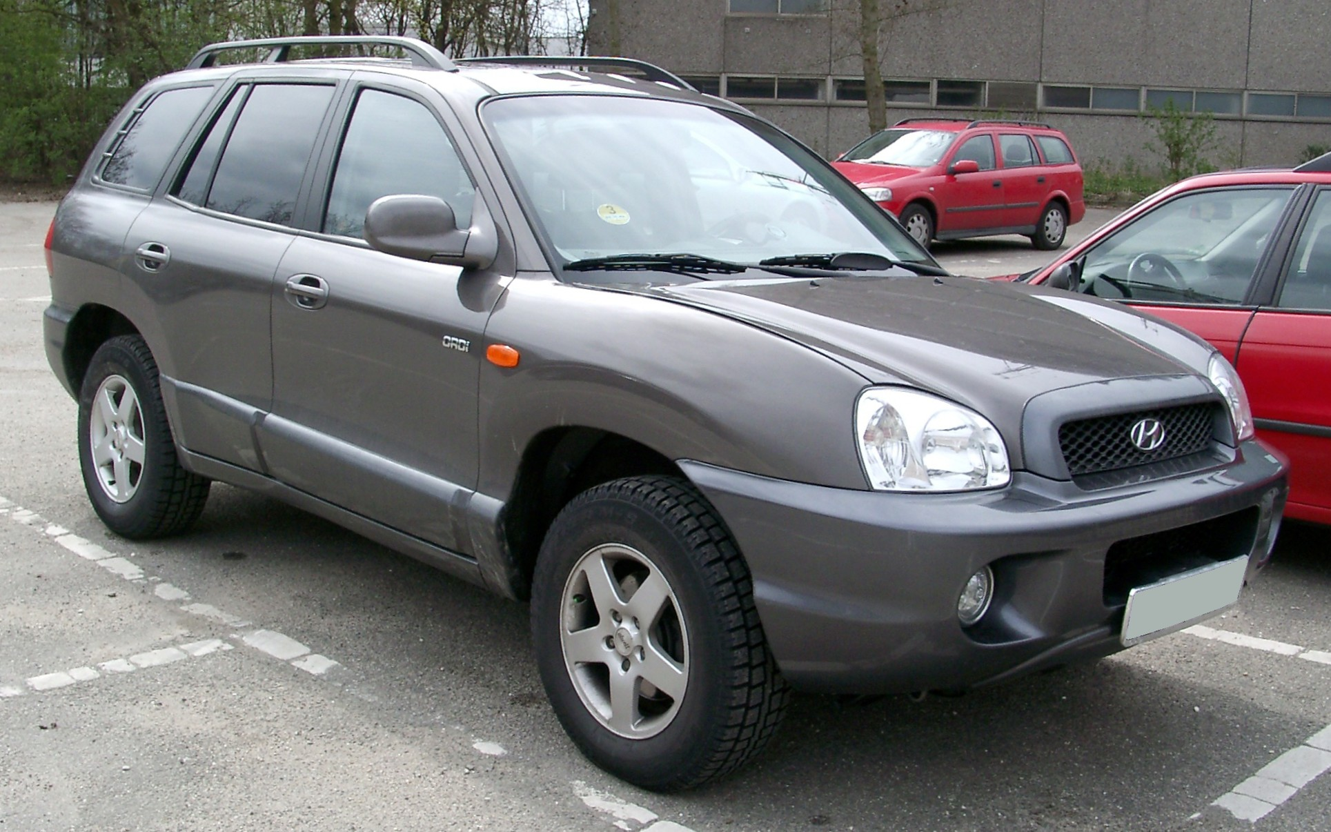 Hyundai Santa Fe